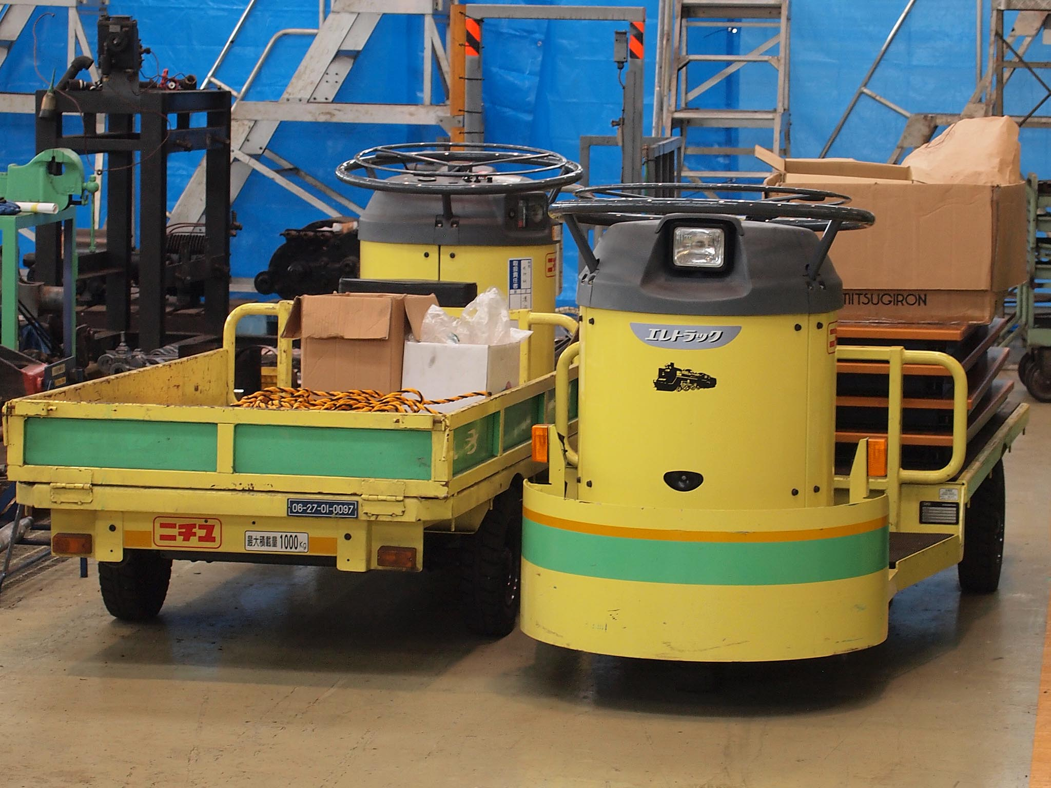 JR東日本・大宮総合車両センターで構内の部品・機材輸送用に用いられるターレットトラック、ニチユ・エレトラック。 イベント開催時に一般開放エリアより撮影